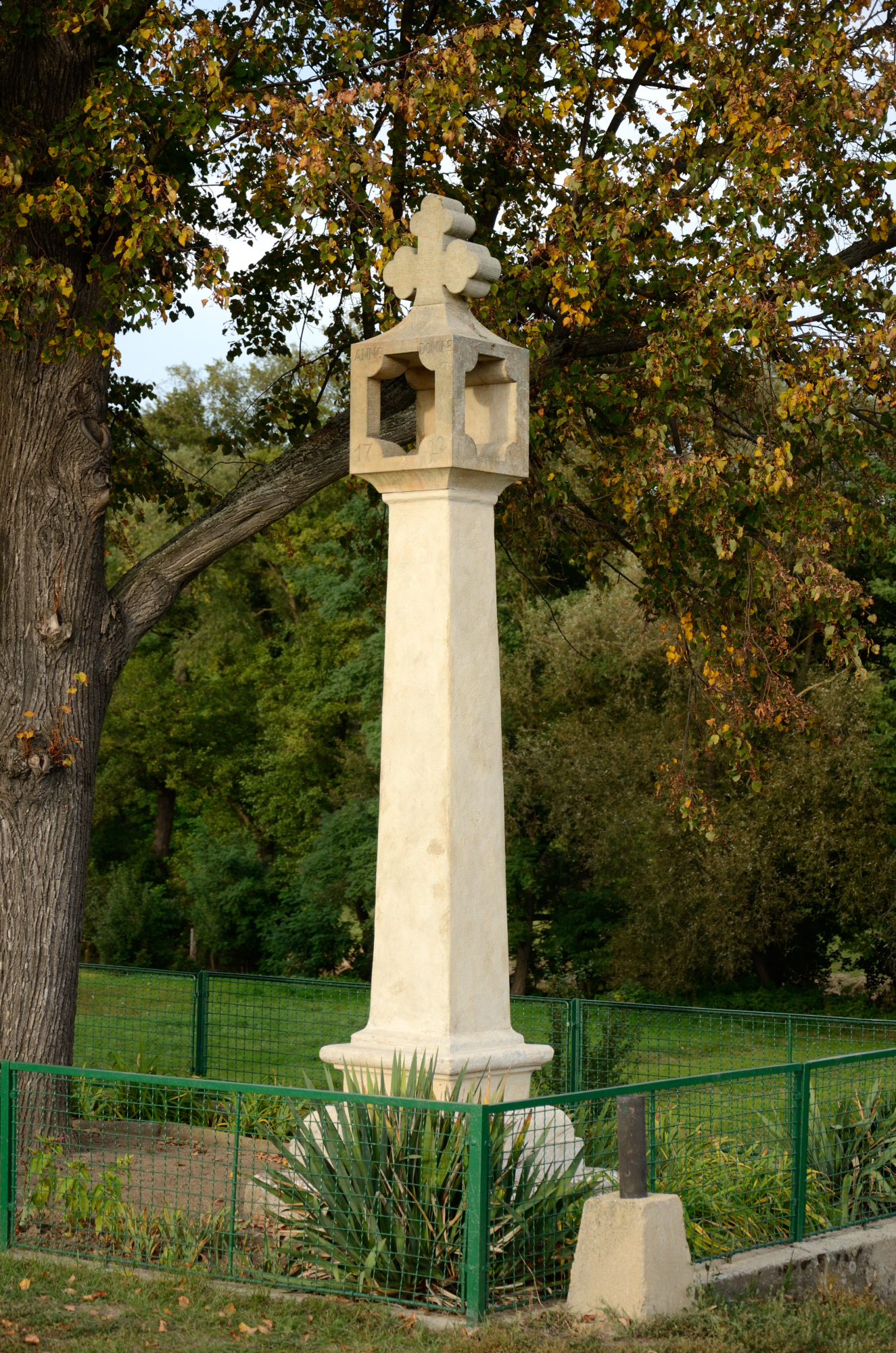 Boží muka (Hrubšice), silnice směr Řeznovice, Hrubšice